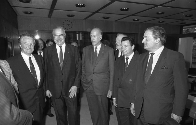 3.6.1987 Besuch einer französischen Parlarmentarierdelegation unter Leitung des Vorsitzenden des Auswärtigen Ausschusses der Nationalversammlung, Valéry Giscard d' Estaing in Bonn.